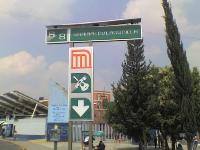 Nuevo letrero de la estación Garibaldi-Lagunilla que usa energía solar como iluminación